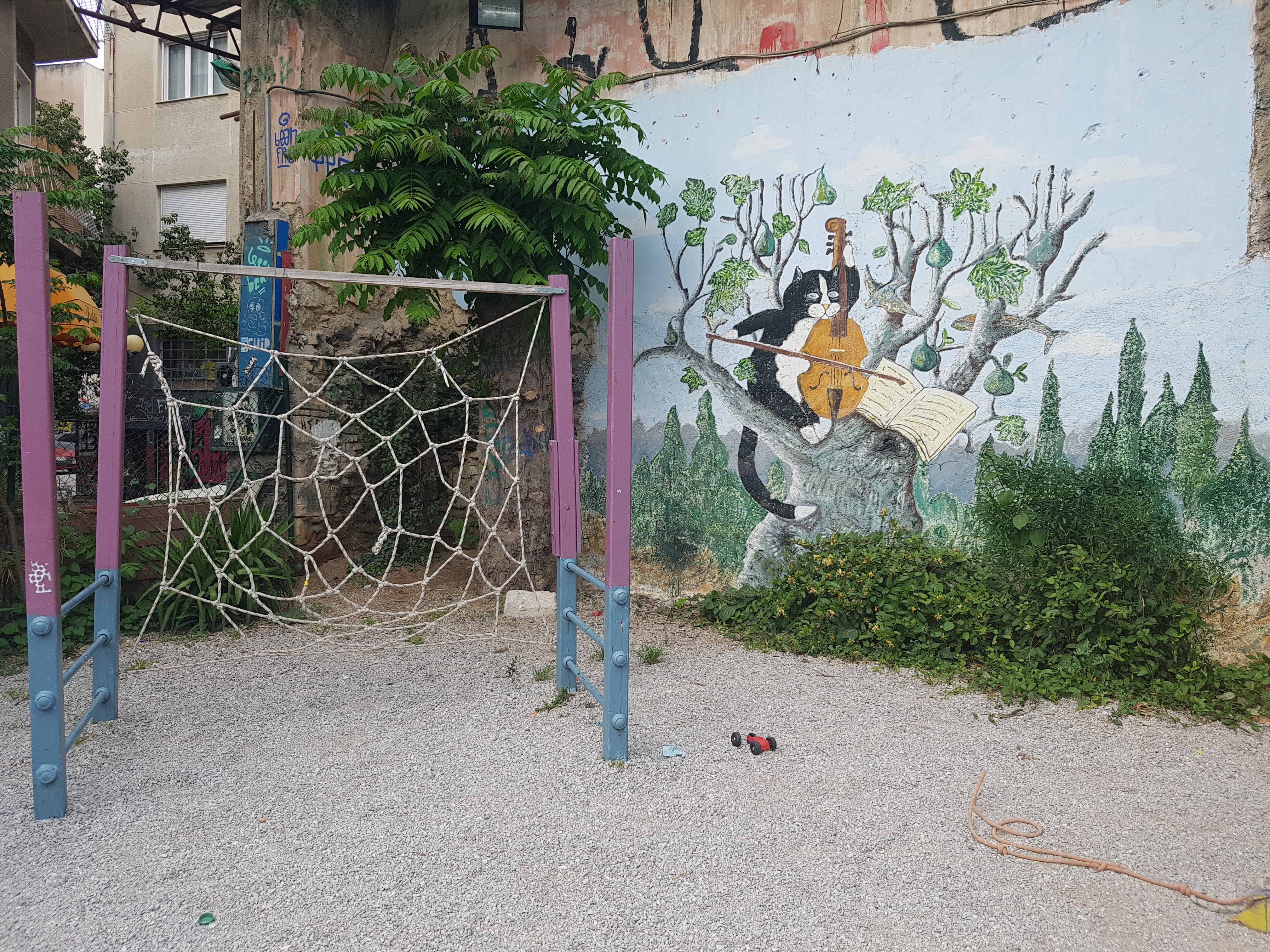 3ο γκράφιτι στο πάρκο Ναυαρίνου